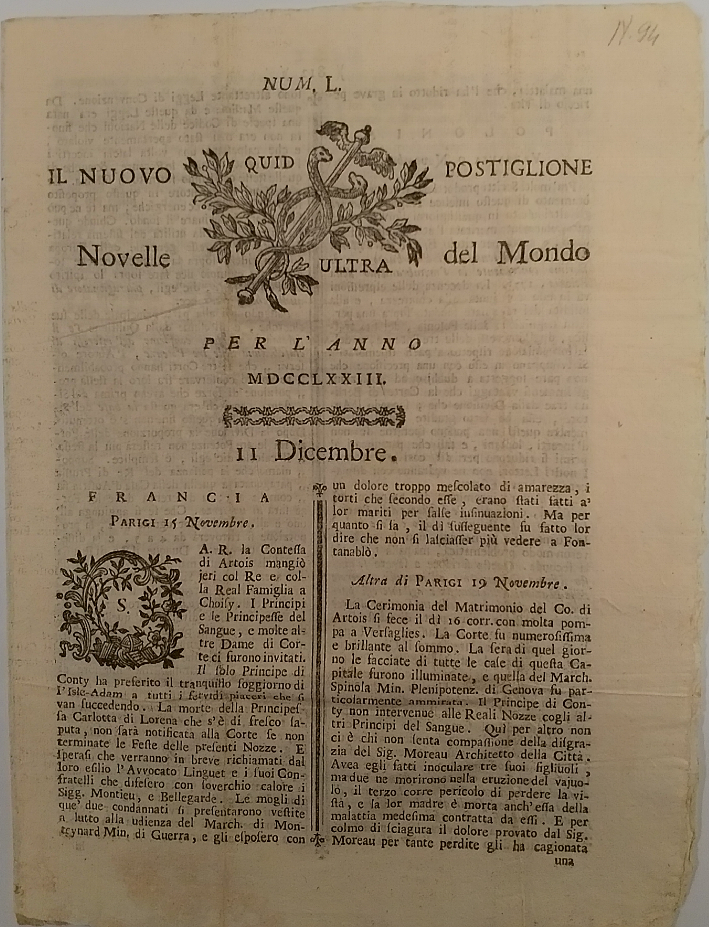 Il Nuovo Postiglione, Gazzetta edita in Venezia, Numero 50, 11 Dicembre 1773